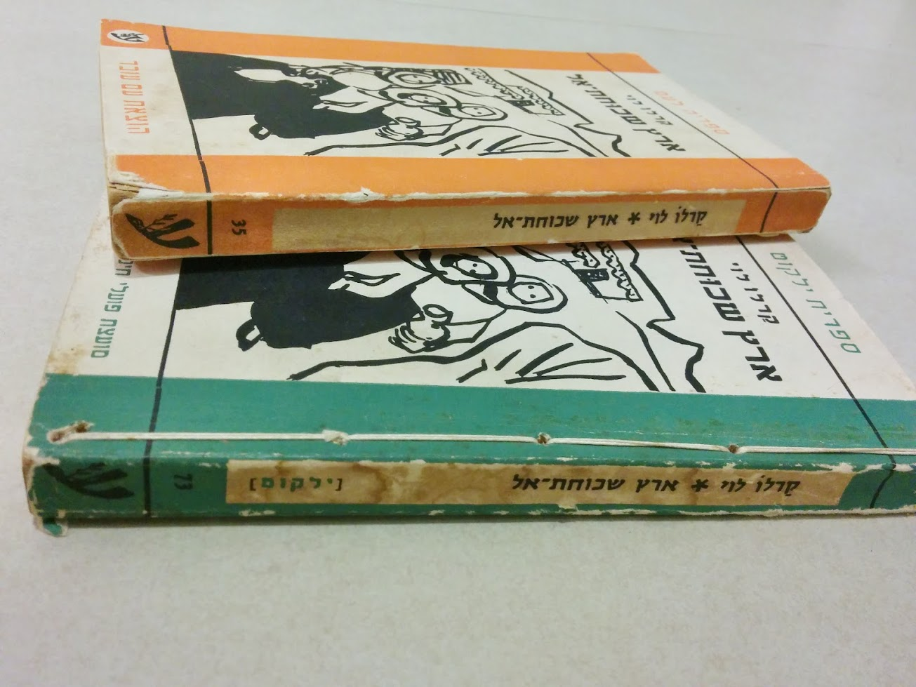 שתי הדפסות שונות של "ארץ שכוחת-אל" מאת קרלו לוי.